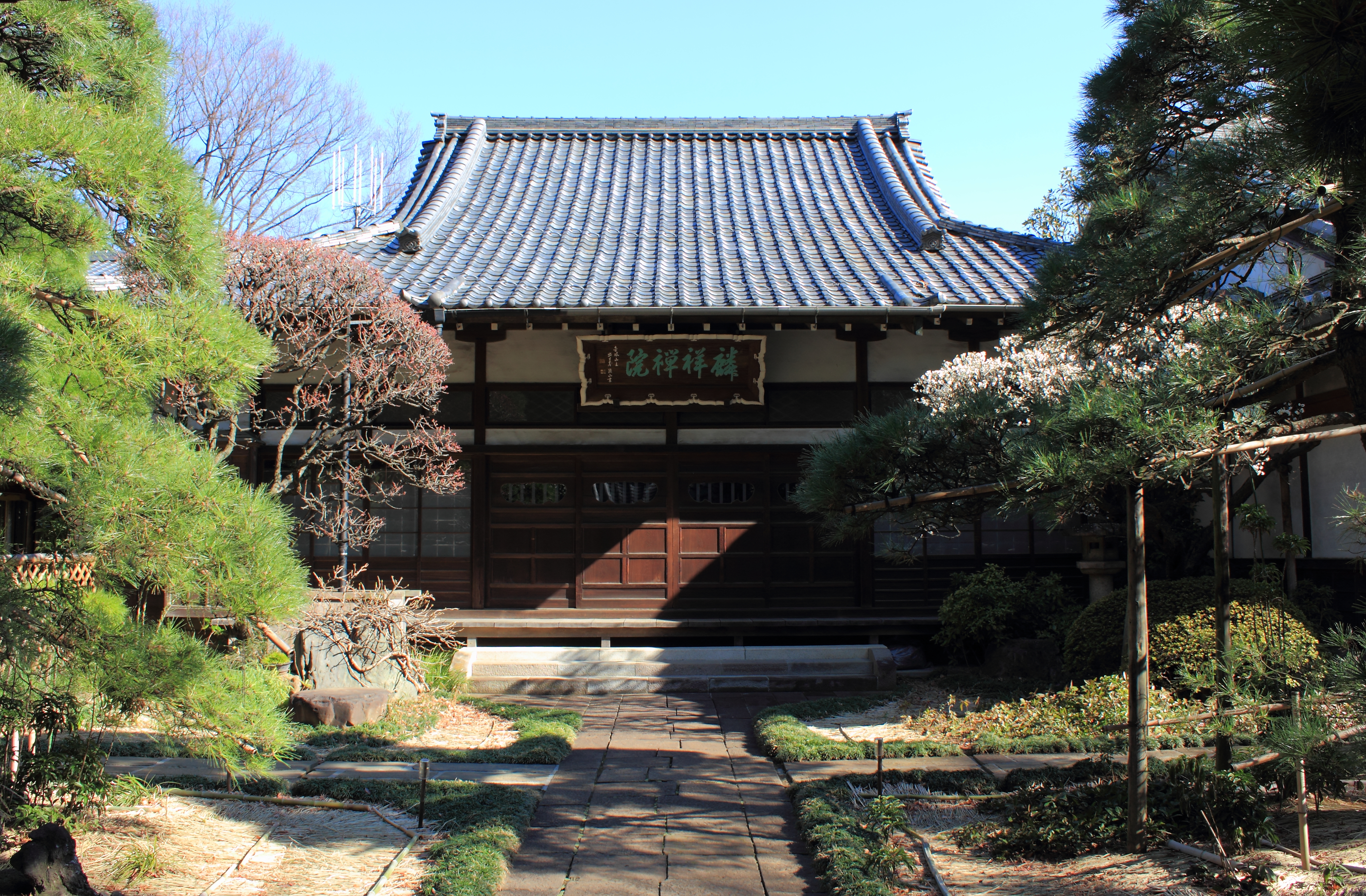 麟祥院（春日局の菩提寺）。東京都文京区湯島。 Canon EOS Kiss X4